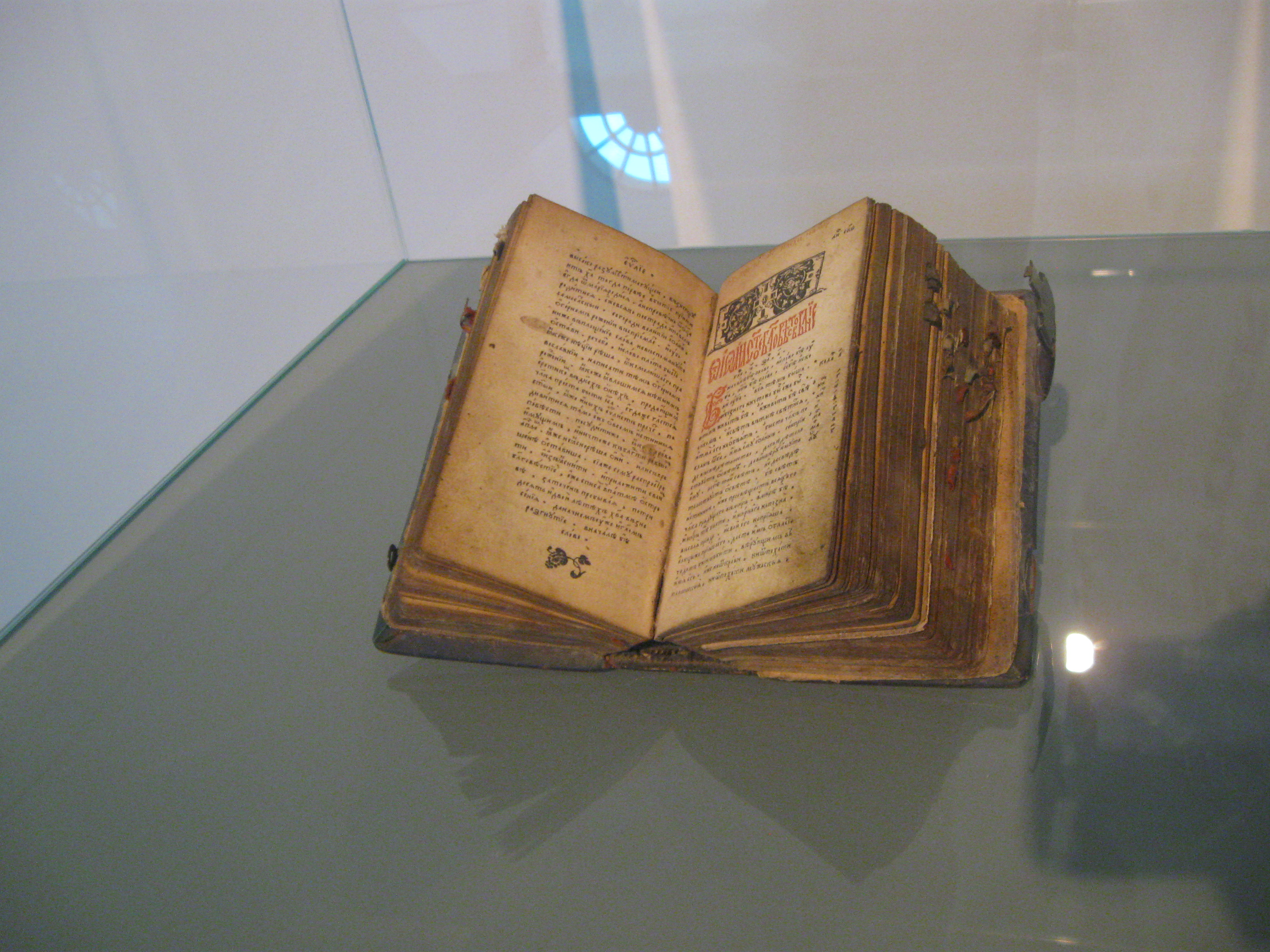 "Євангеліє" (1581р., Острог, Друкар Іван Федоров) Виставка "Велике і Величне". Мистецький арсенал. 2013